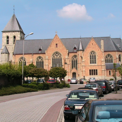 dum mia ekskurso